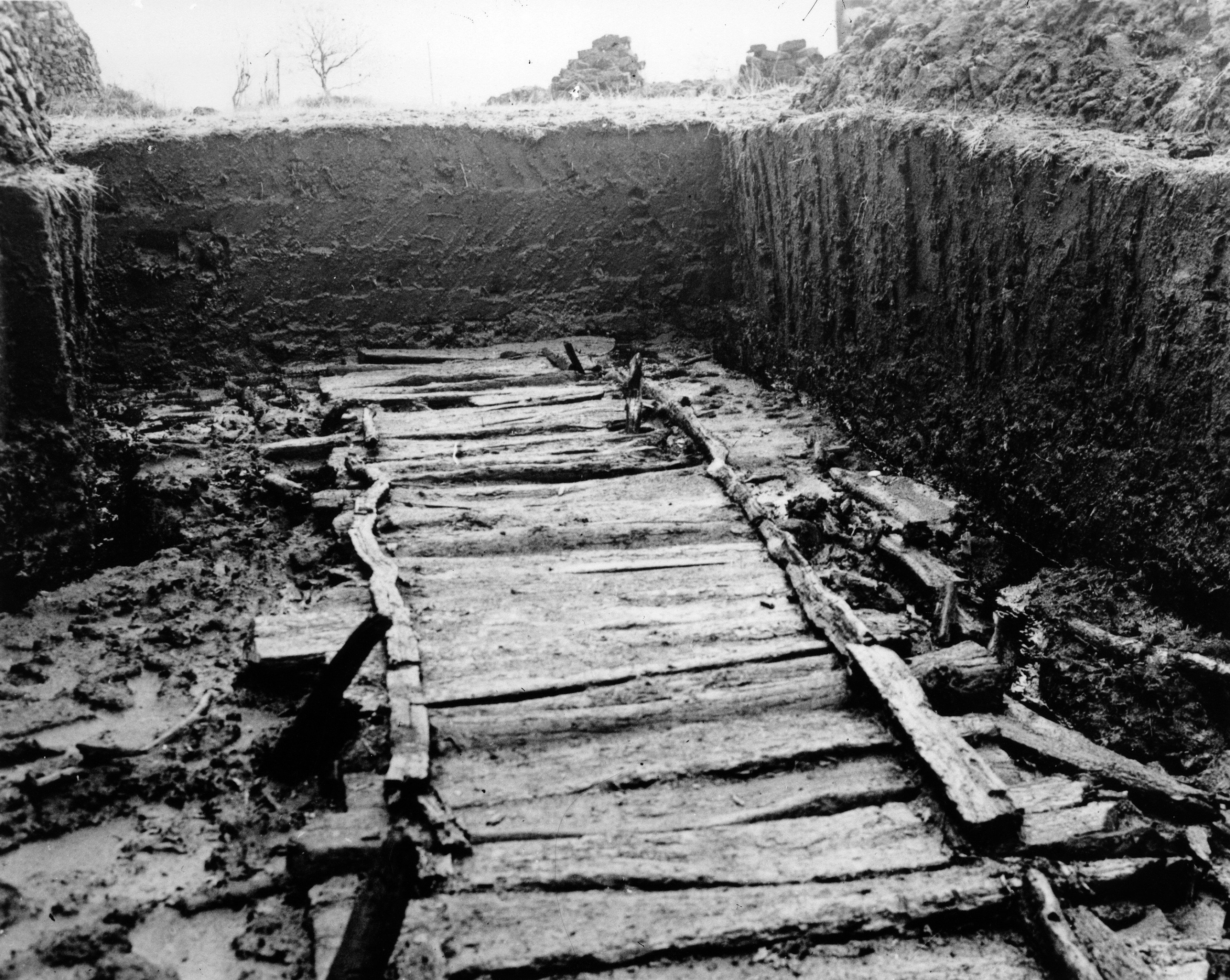 circa 330 AD Iron Ageera QS:P2348,Q11764